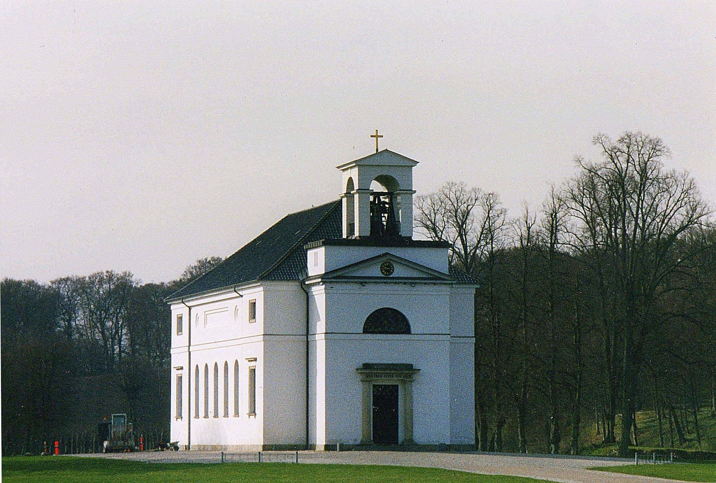 Hørsholm Kirke, Hørsholm Sogn, Hørsholm kommune